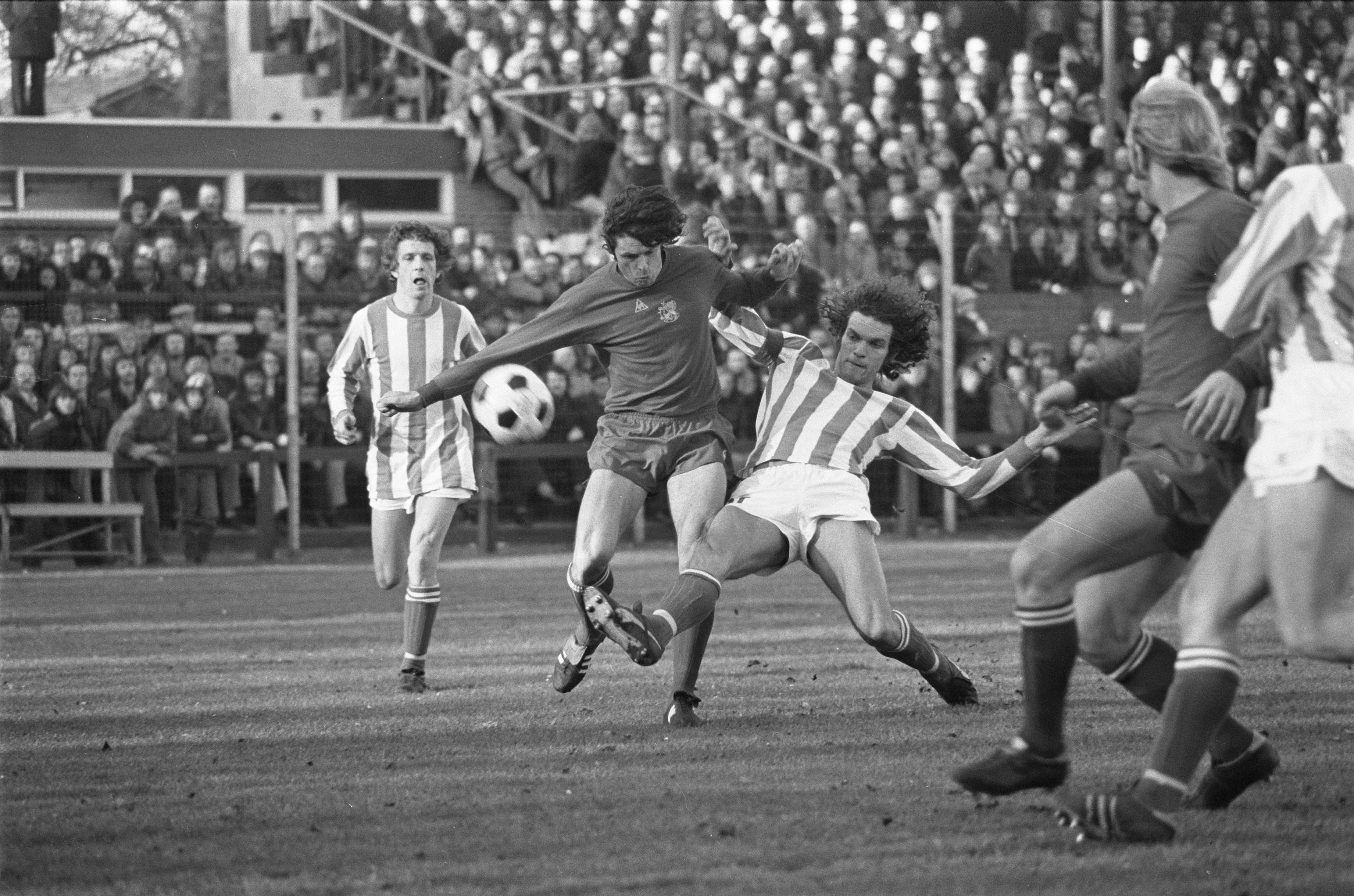 Collectie / Archief : Fotocollectie Anefo Reportage / Serie : [ onbekend ] Beschrijving : Wageningen tegen Ajax -02, Suurbier in fel duel met Wellerdieck Datum : 26 januari 1975 Locatie : Gelderland, Wageningen Trefwoorden : sport, voetbal Persoonsnaam : Suurbier, Wim Fotograaf : Verhoeff, Bert / Anefo Auteursrechthebbende : Nationaal Archief Materiaalsoort : Negatief (zwart/wit) Nummer archiefinventaris : bekijk toegang 2.24.01.05 Bestanddeelnummer : 927-7149